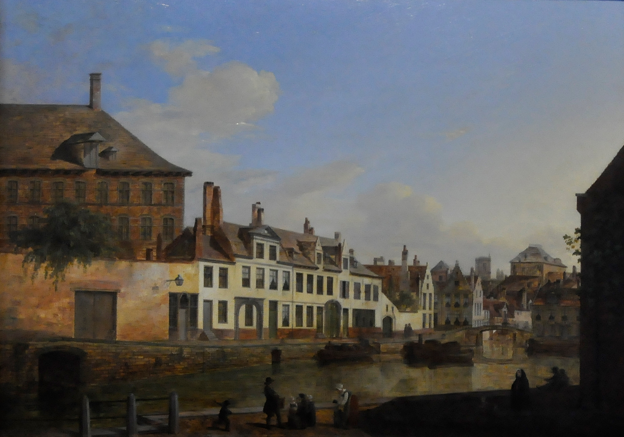 Pieter-Frans De Noter (1779-1842) - Augustijnenkaai aan de Lieve - STAM Gent